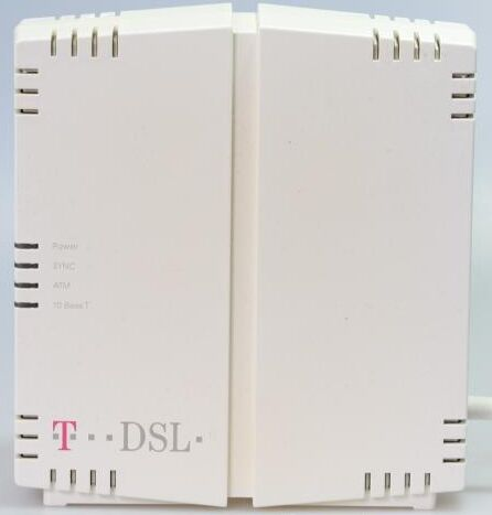 DSL-Modem (NTBA) der zweiten Generation von Siemens